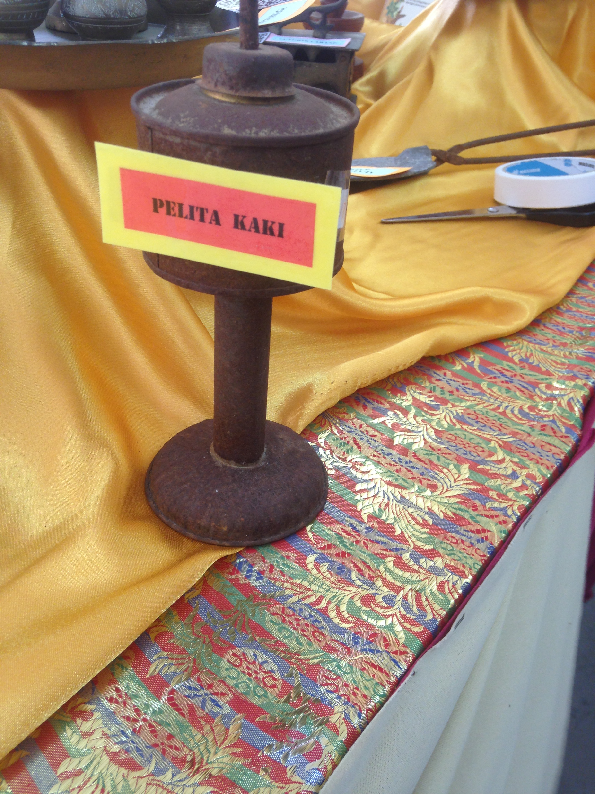 PELITA KAKI